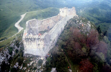 Depicted place: Château de Montségur